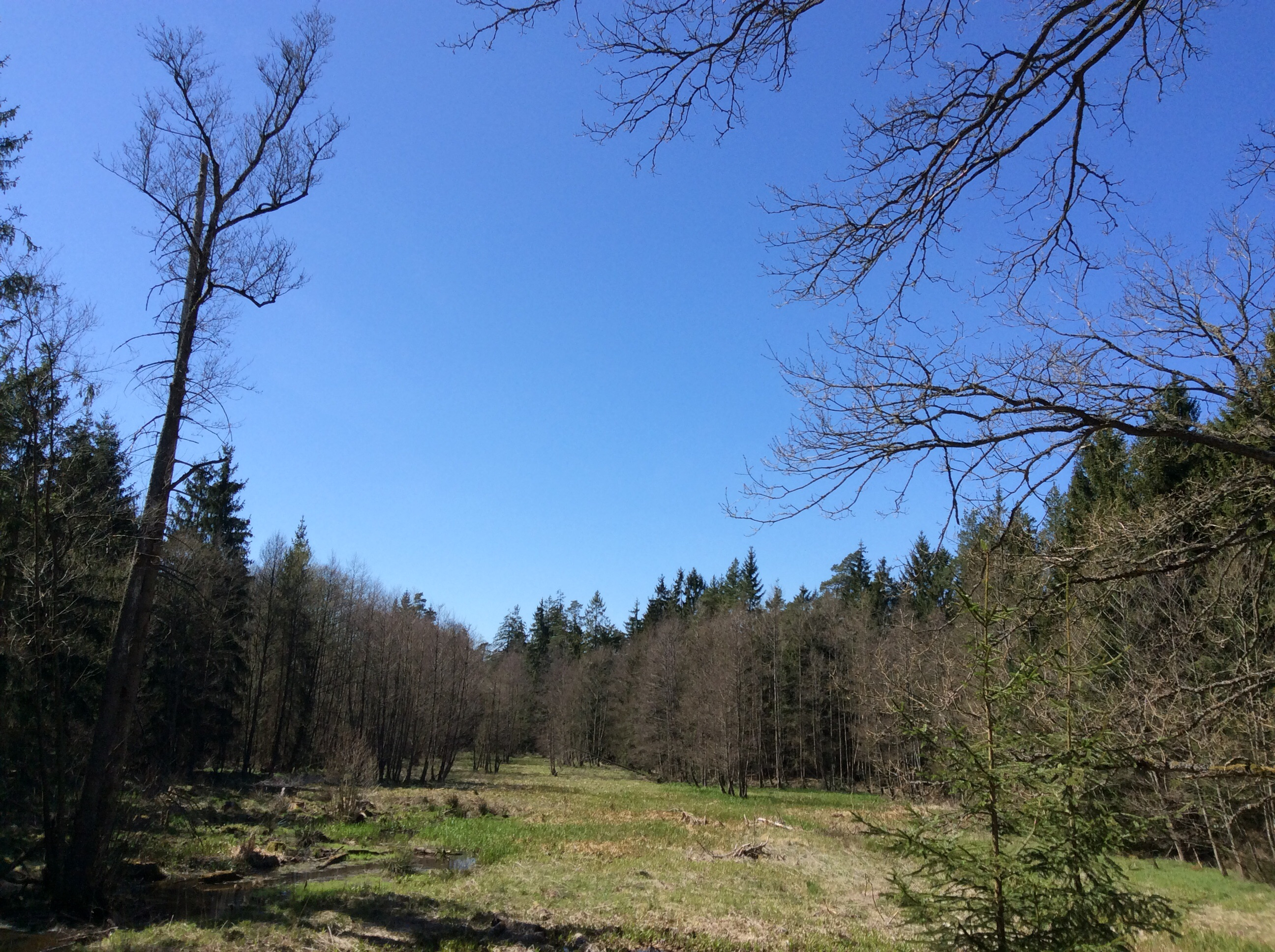 Dieser sumpfige Grünstreifen zieht sich einige Kilometer durch den Mönchswald im fränkischen Seenland; Landkreis Weißenburg-Gunzenhausen, Mittelfranken, Bayern. – Abgebildeter Bereich eventuell im FFH-Gebiet DE-6830-371 gelegen?